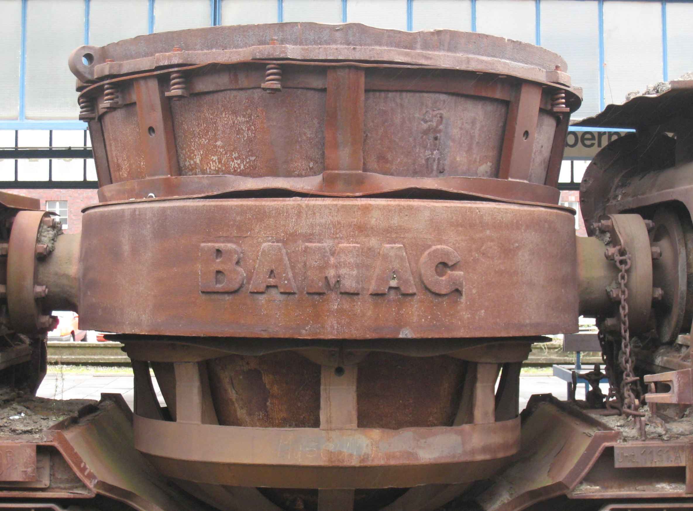 Historischer Wagon zum Transport von flüssiger Schlacke. Bamag. Museumsbahnsteig HBF Oberhausen. Rheinisches Industriemuseum.